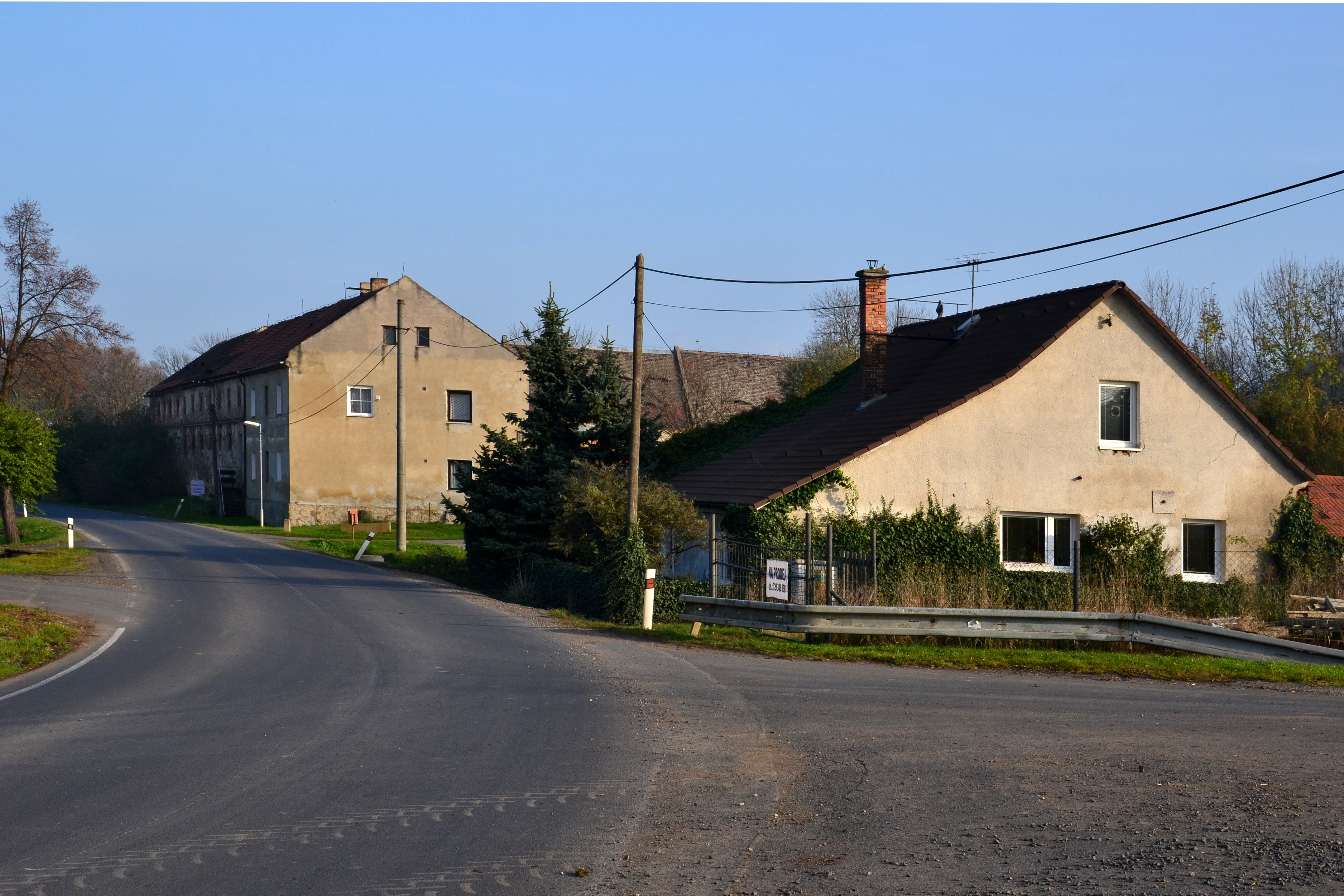 Saběnice - křižovatka ve středu vesnice